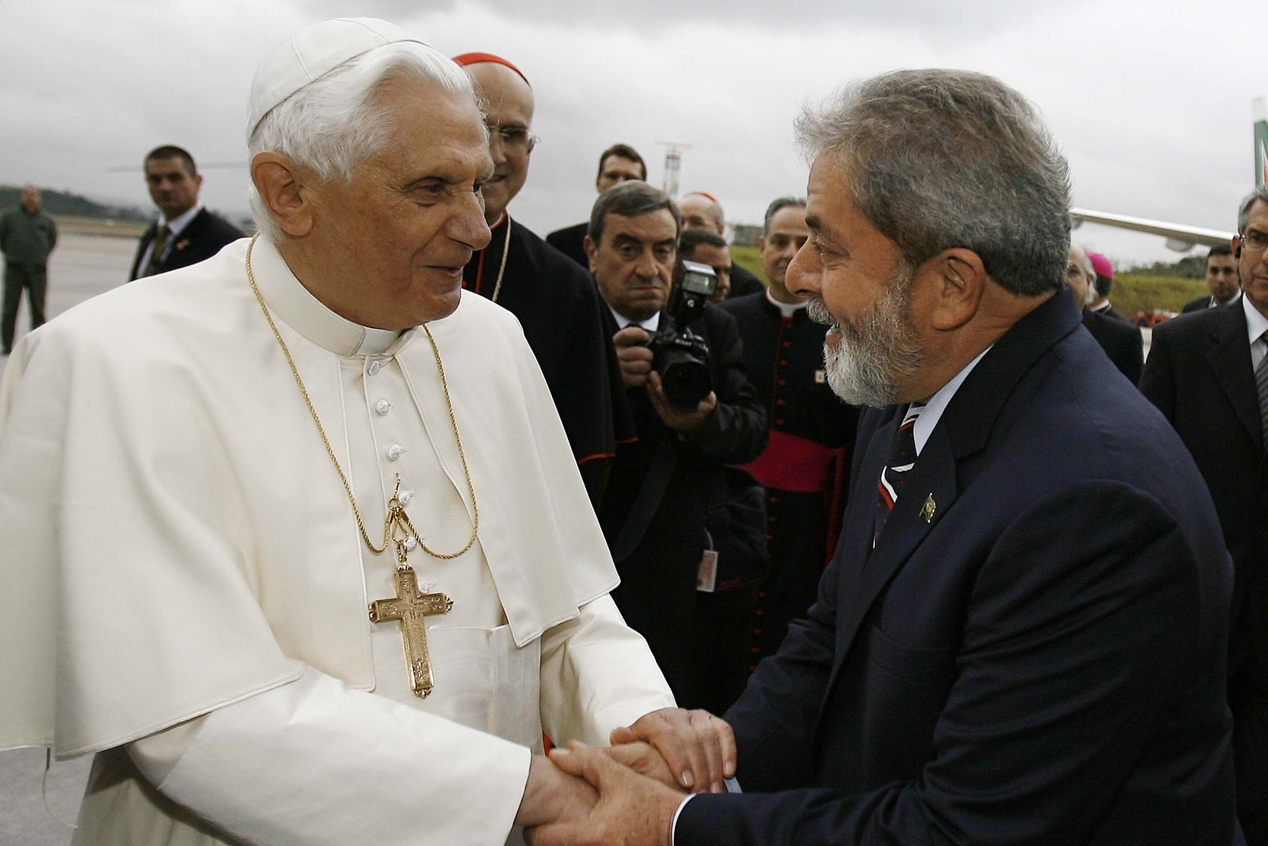 Bento XVI chega a São Paulo e é recebido pelo presidente do Brasil, Luís Inácio Lula da Silva.